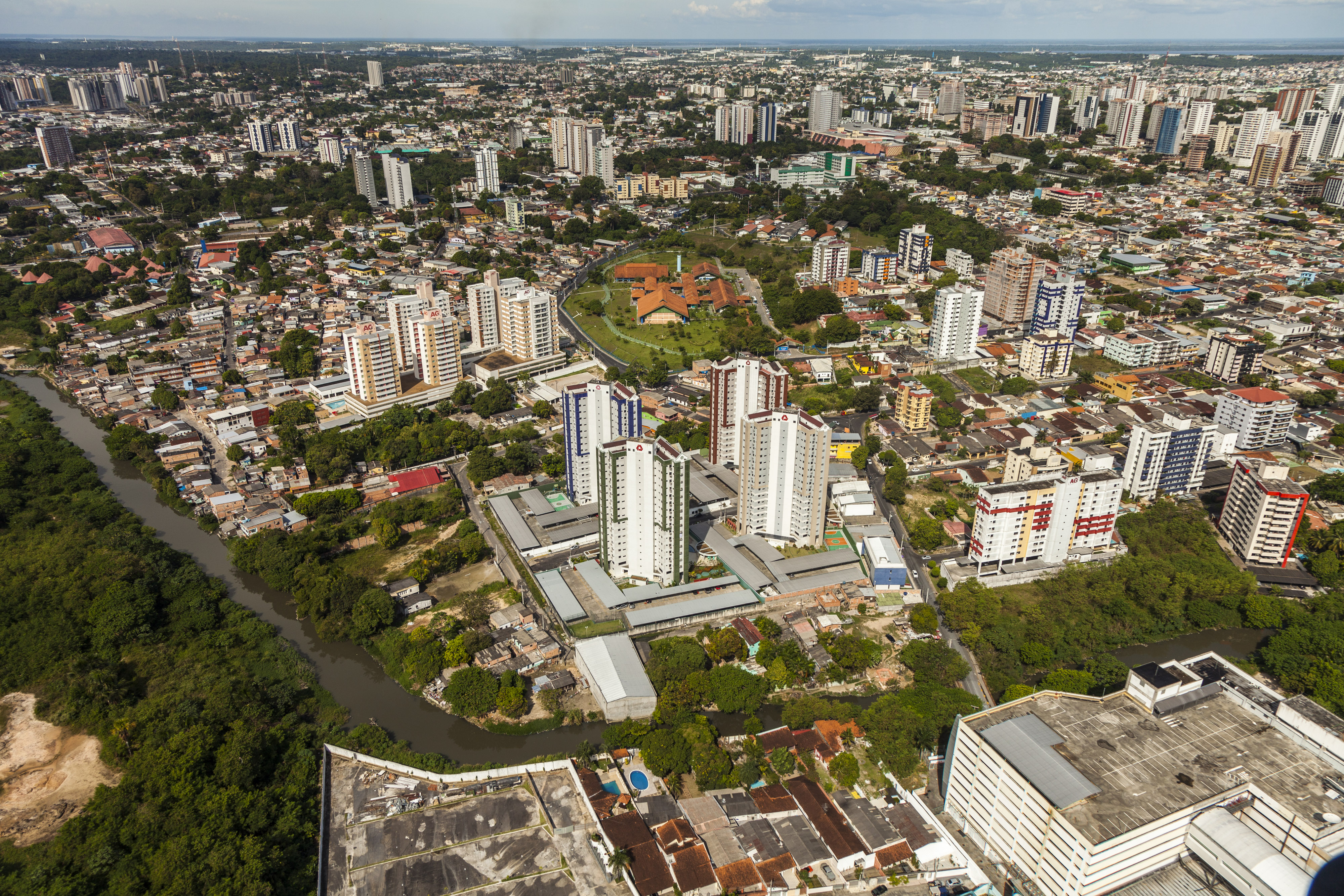 Bairros da Zona Centro-Sul de Manaus - Amazonas